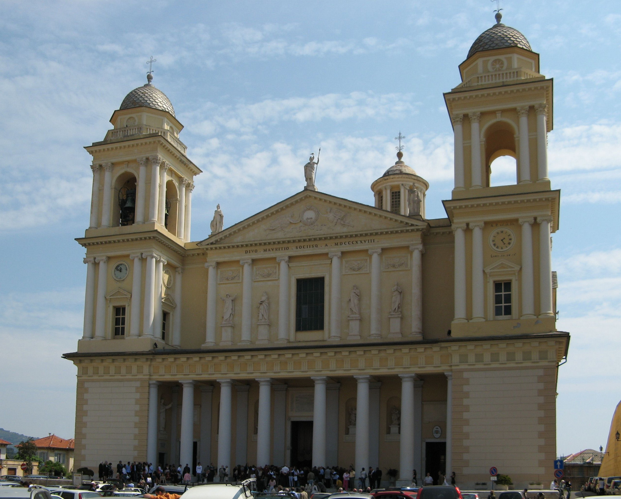 Duomo di S.Maurizio, Porto Maurizio, Imperia, Italy